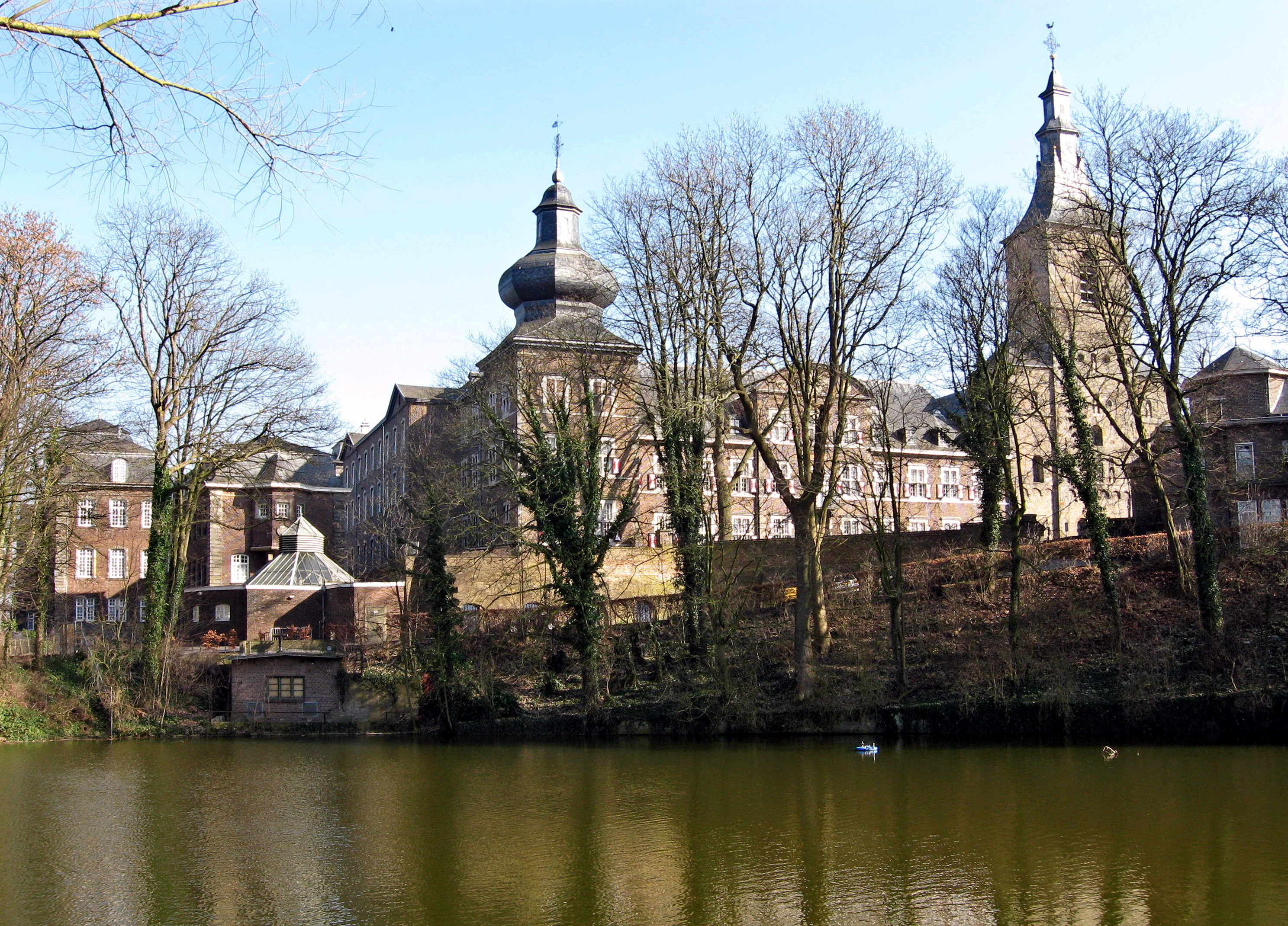 Blick vom Weiher